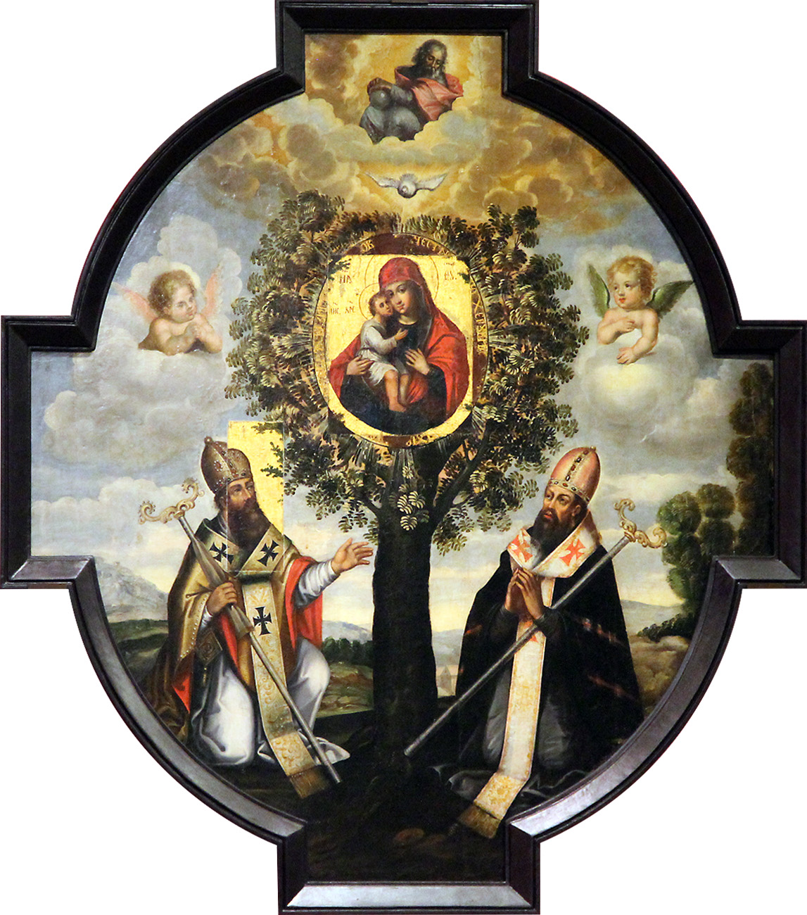 Беларуская (тарашкевіца): Зьяўленьне Маці Божай Жыровіцкай (Maci Božaja Žyrovickaja) з царквы Прачыстай Багародзіцы Жыровіцкага манастыра